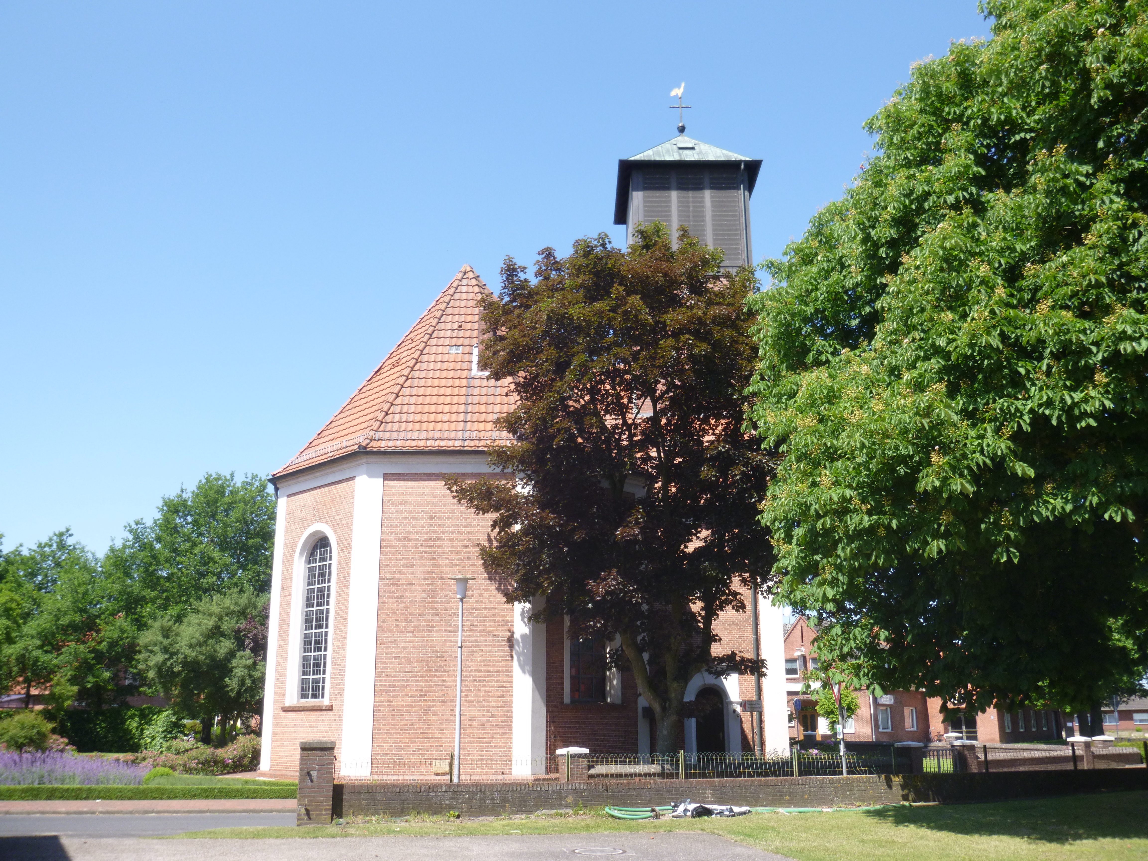 katolika kirko Sankta Nikolao en Sustrum, distrikto Emsland, Germanio